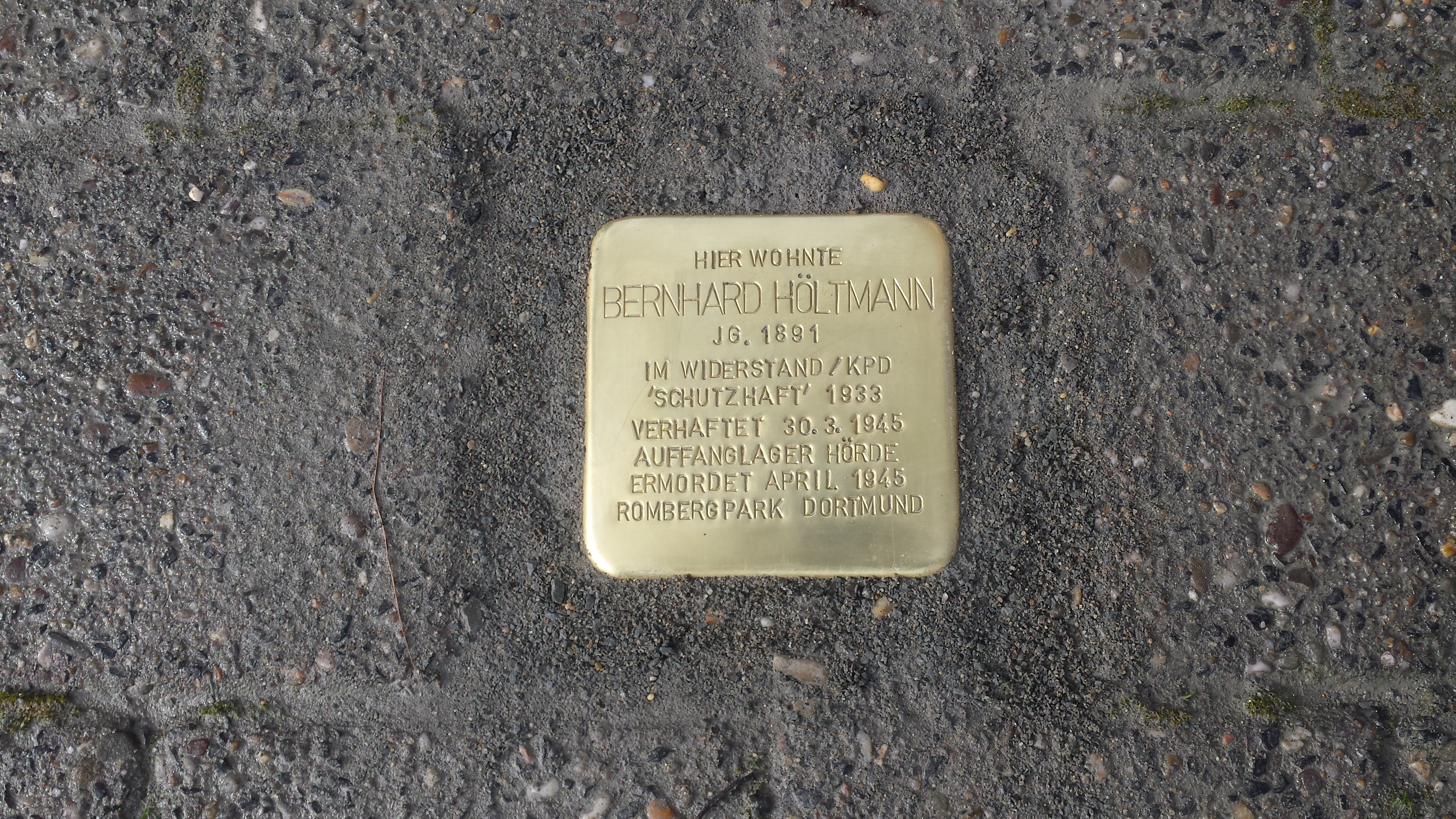 Bernhard Höltmann, 2019